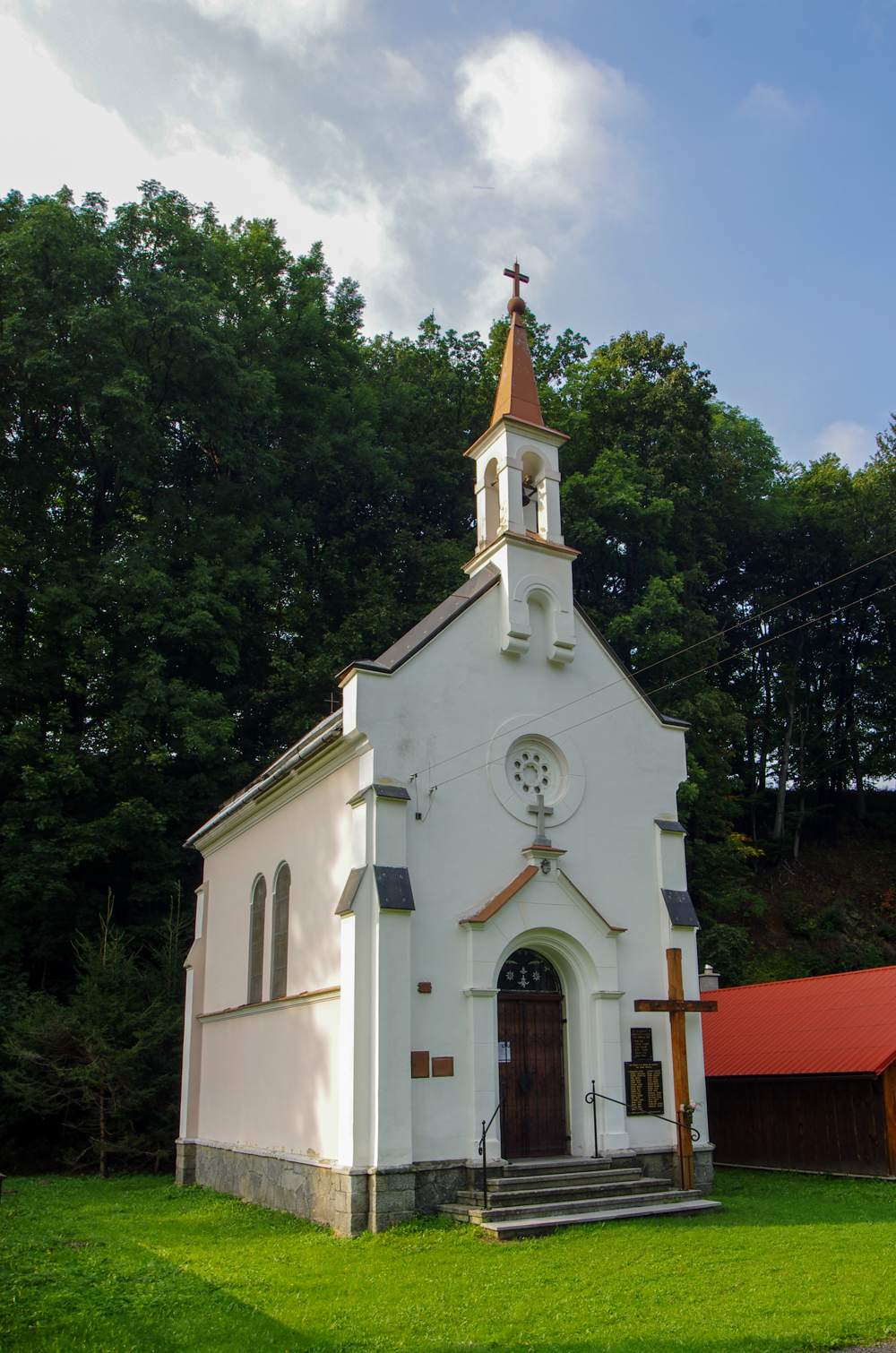 Nýznerov, kostel Nanebevzetí Panny Marie, okres Jeseník